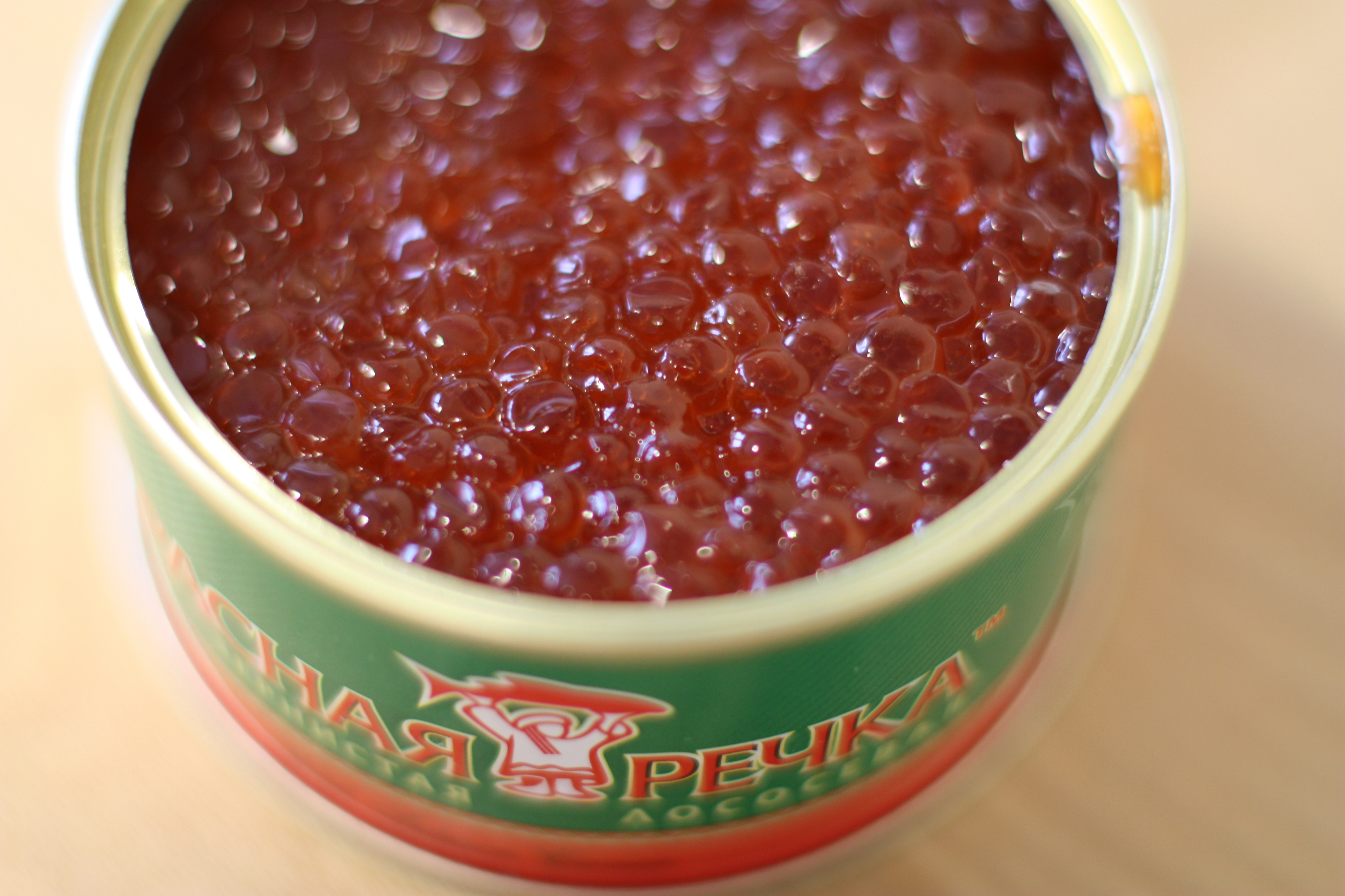 Lachskaviar, Salmon roe, Red caviar, Красная икра